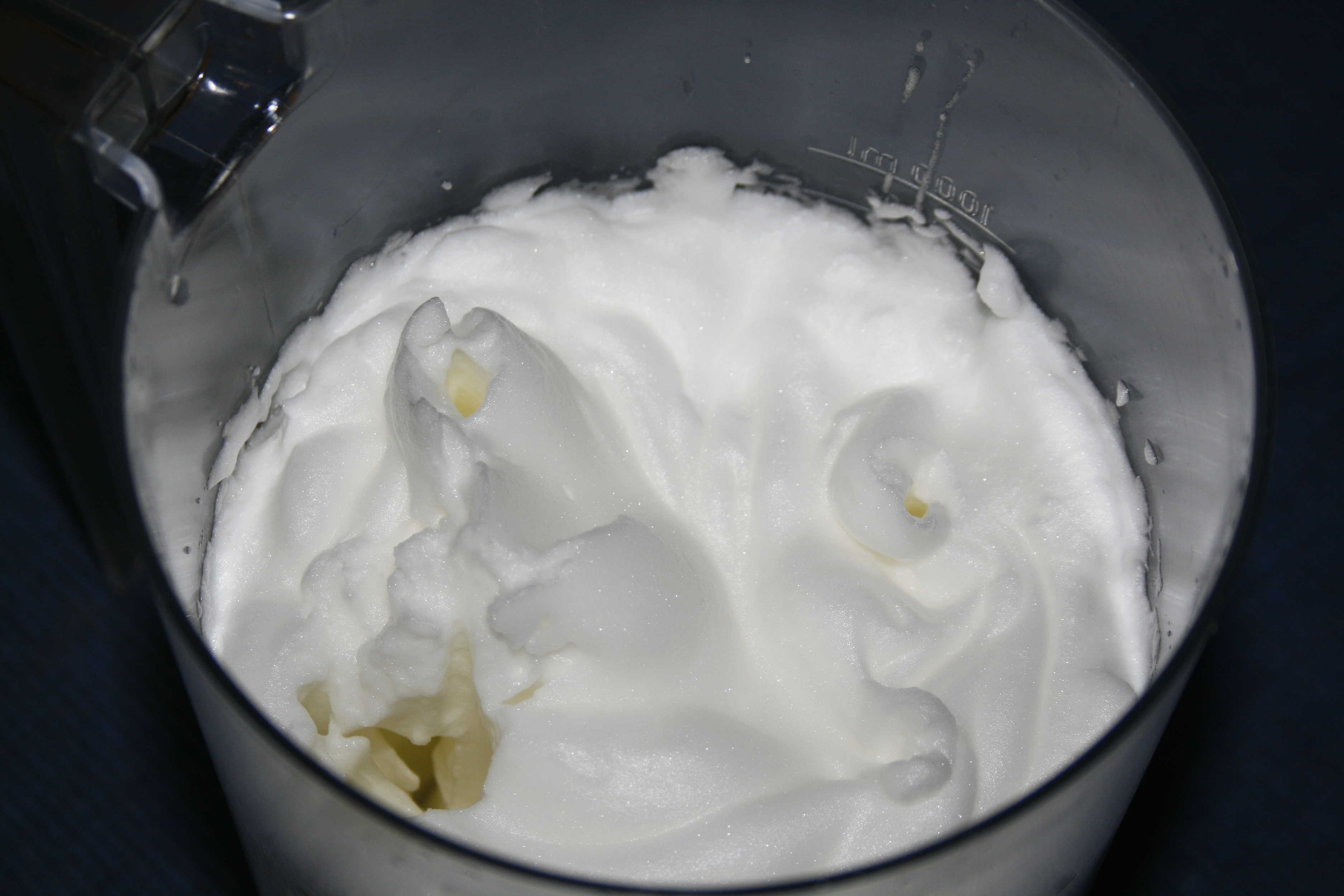 Sníh v nádobě ručního šlehače.